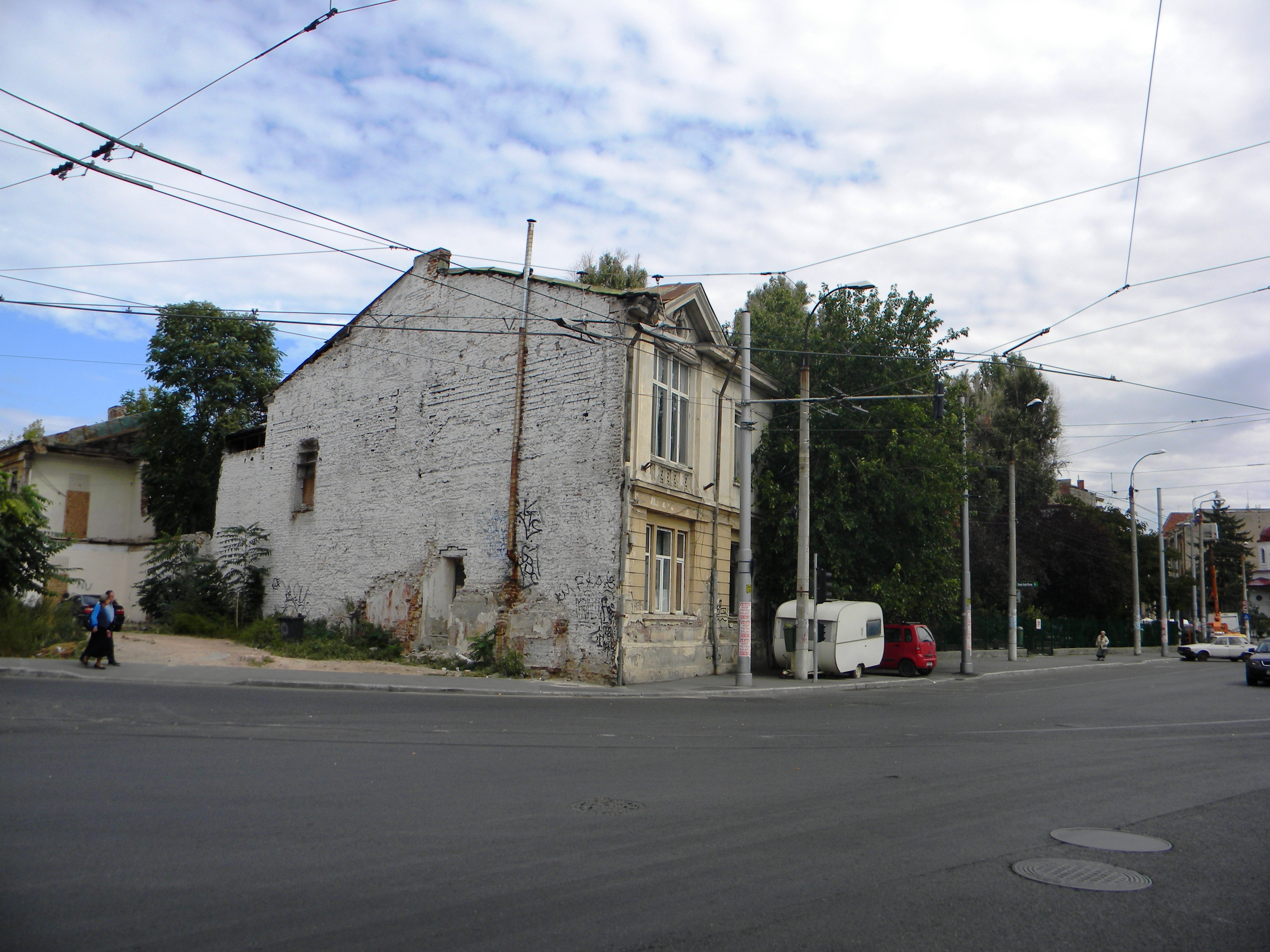 Bucuresti, Romania, Calea Plevnei nr. 40 sect. 1 (Casa unde a locuit George Cosbuc) (vedere de ansamblu)